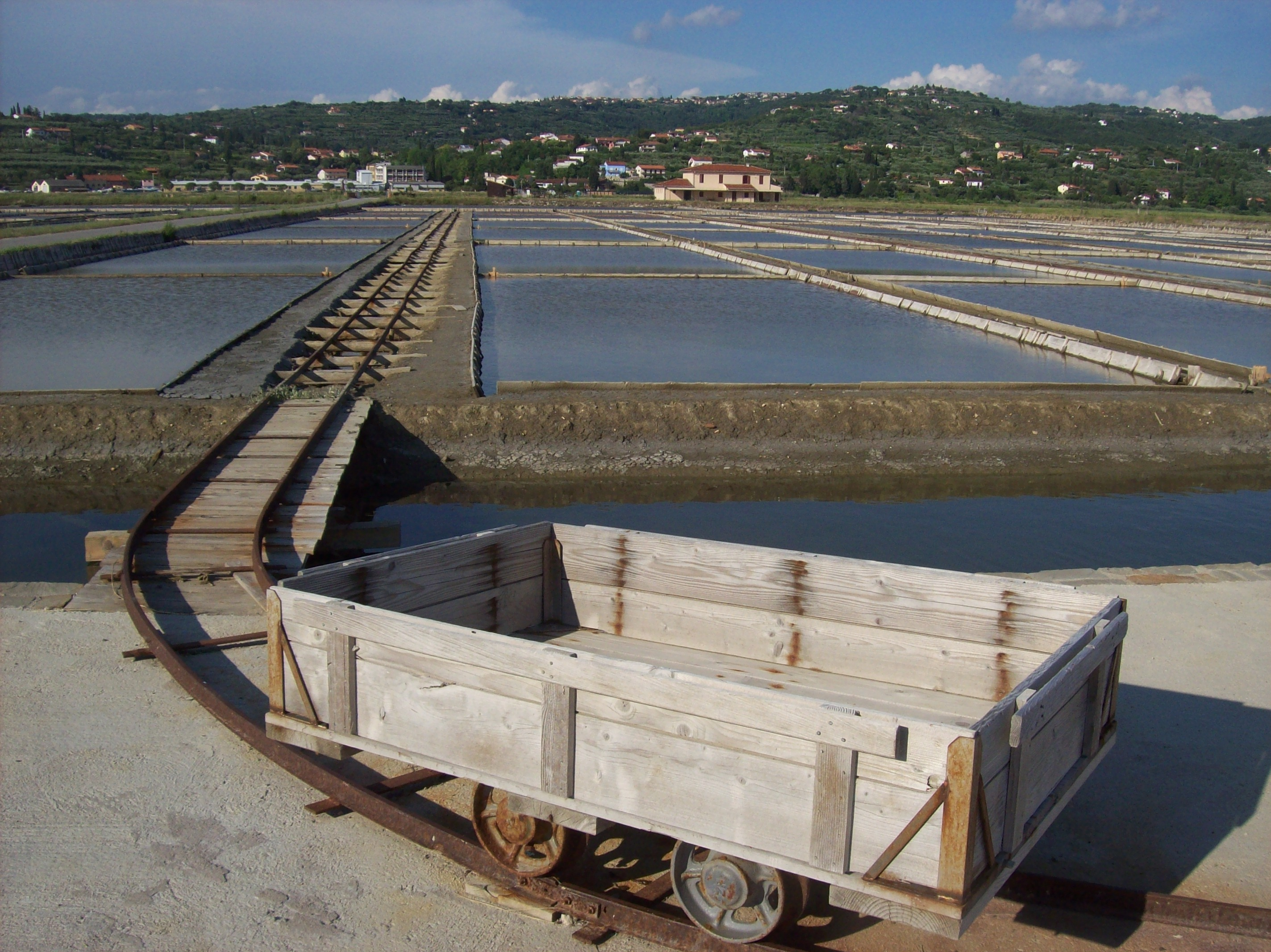 Sečoveljske soline (Slovenija) - solinarski voziček